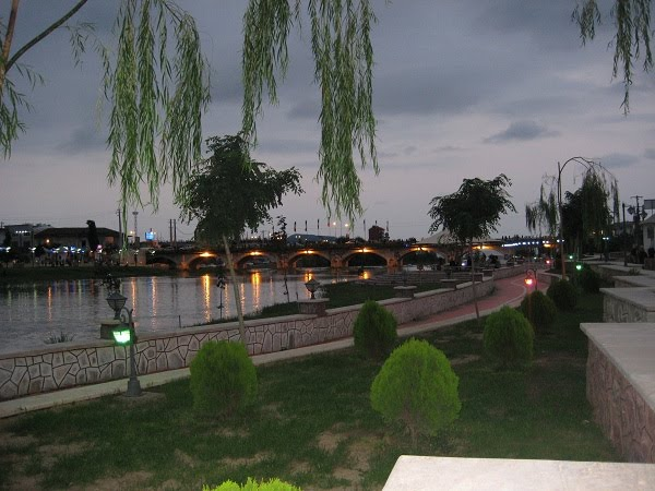 پل چشمه کیله